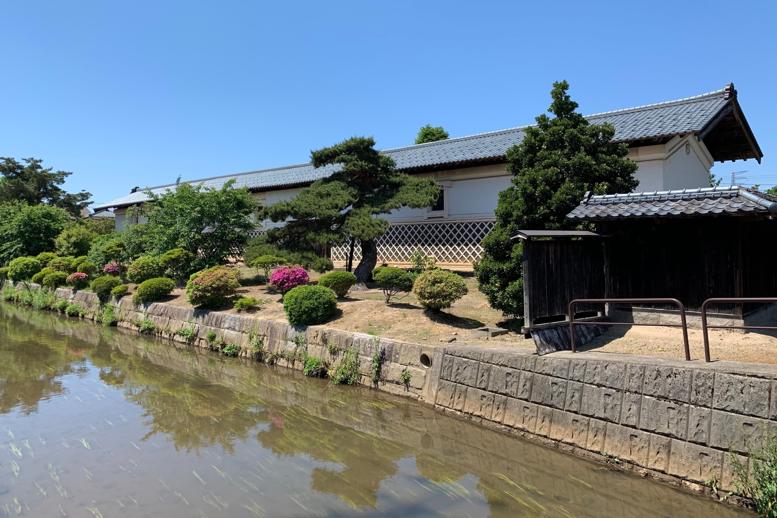 水原・無為信寺向かいにある旧佐藤家米蔵と駒林川（阿賀野市，2020年5月．公道から撮影）